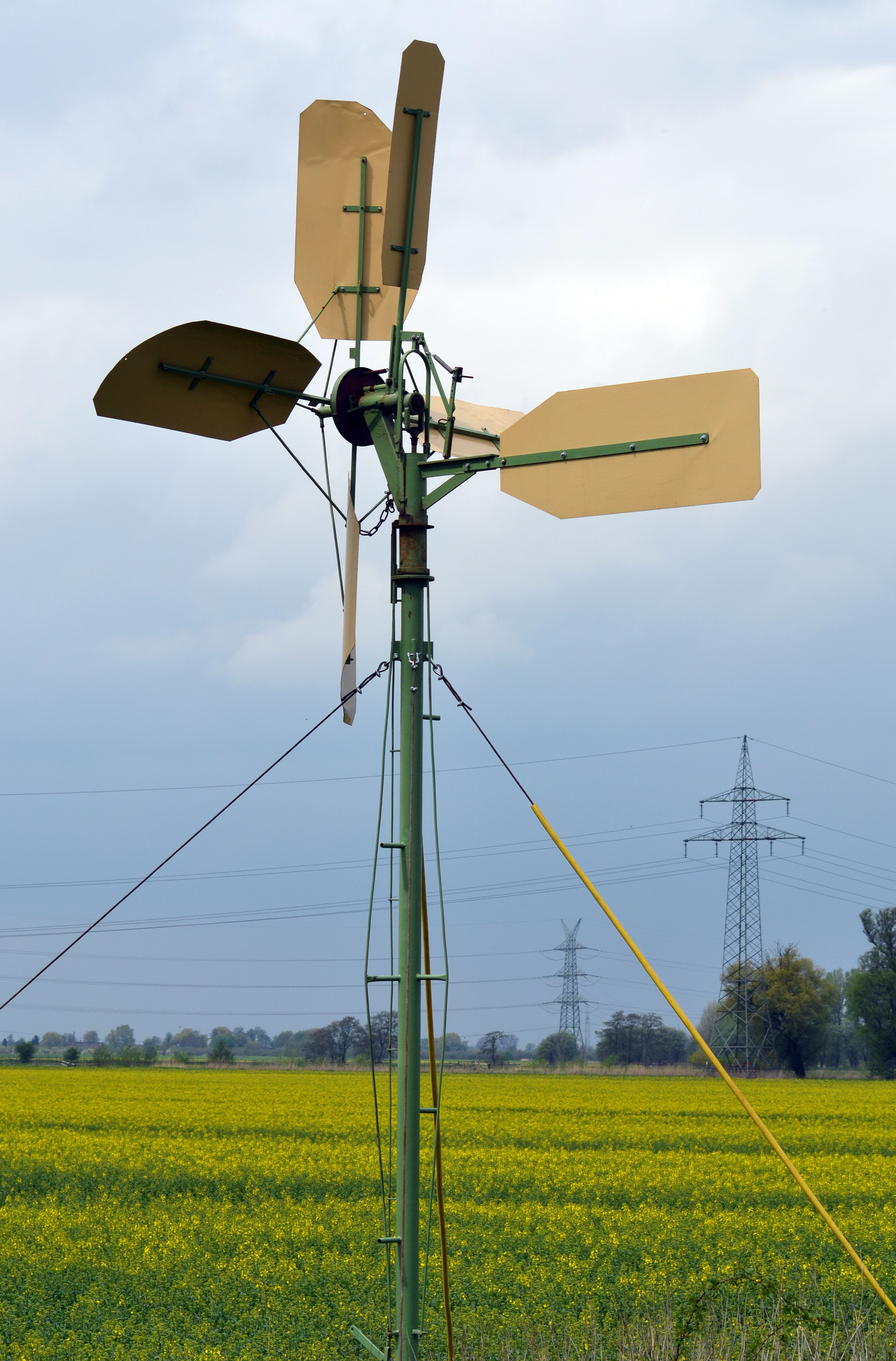 Drainage-Windrad. An den Wischen im Holm. Originalgetreu wiederaufgebaut nach der Vorlage des zerstörten Windrads (Kulturdenkmal von öffentlichem Interesse).